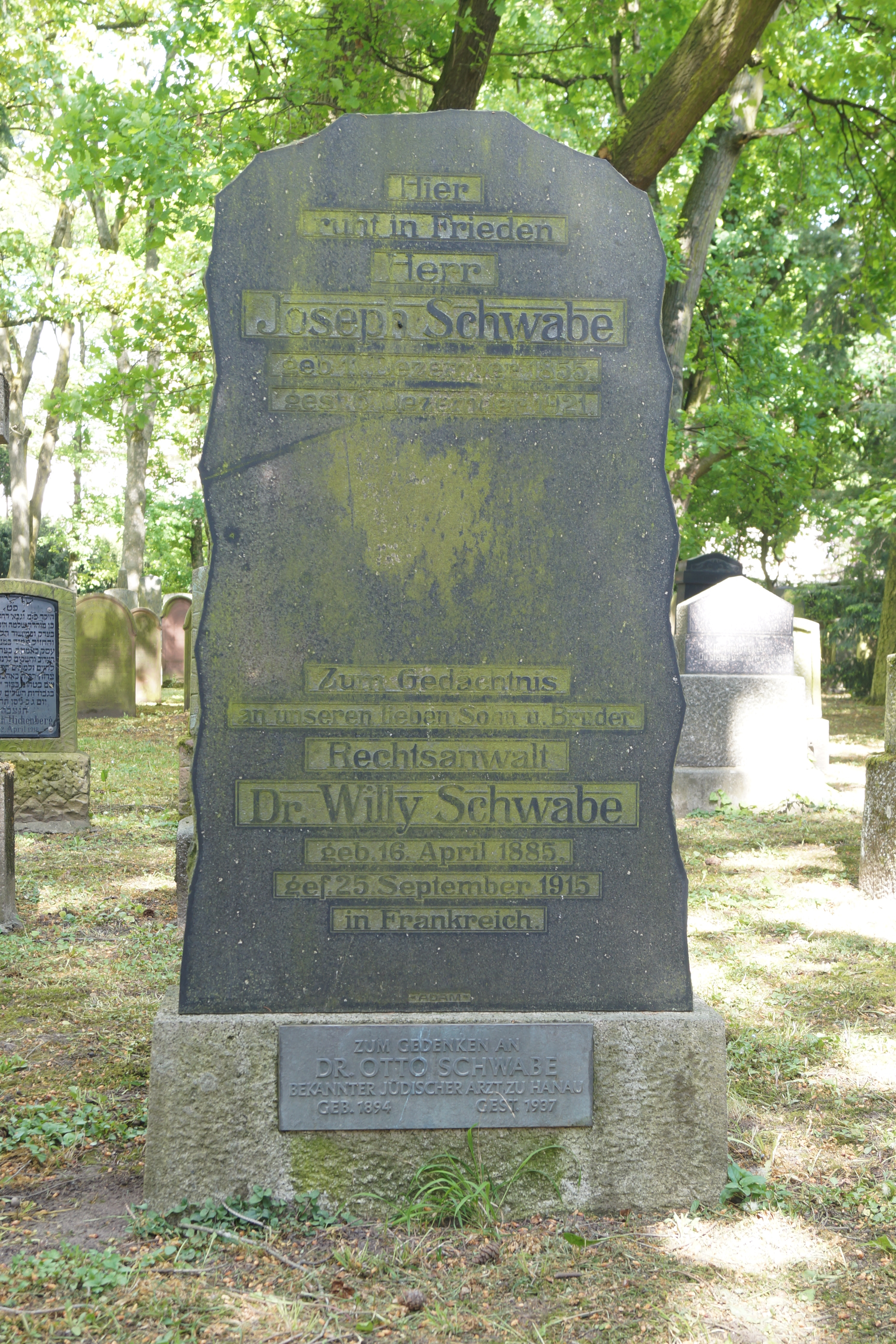 Grabstein der Familie Schwabe auf dem Jüdischen Friedhof in Hanau, Hessen.